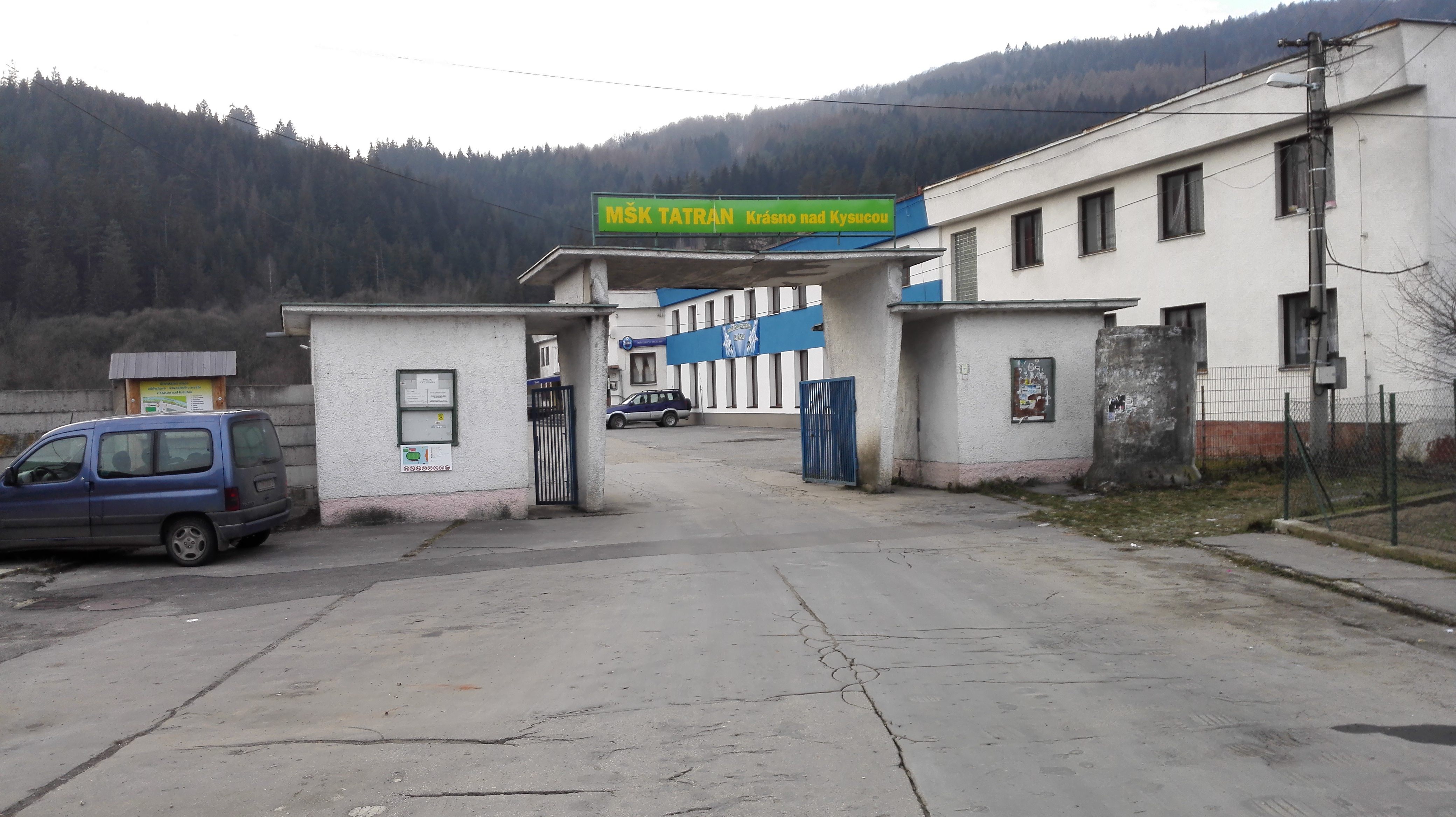 Vstupná brána do športového areálu v Krásne nad Kysucou.